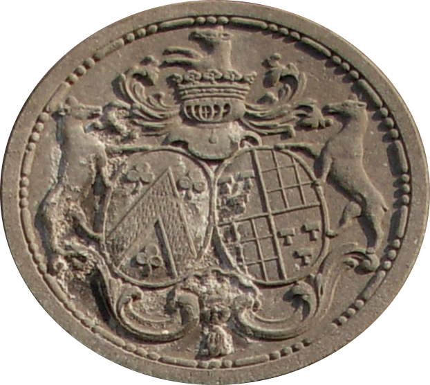 Blasonnement: écu de gauche (famille de Biseau): d'azur, au chevron d'or, accompagné de trois trèfles d'argent. écu de droite (famille Tacqunier) : écartelé aux 1er et 4e, d’or à trois maillets (droits); aux 2e et 3e, cinq points d’or, équipolés à quatre points de sable.